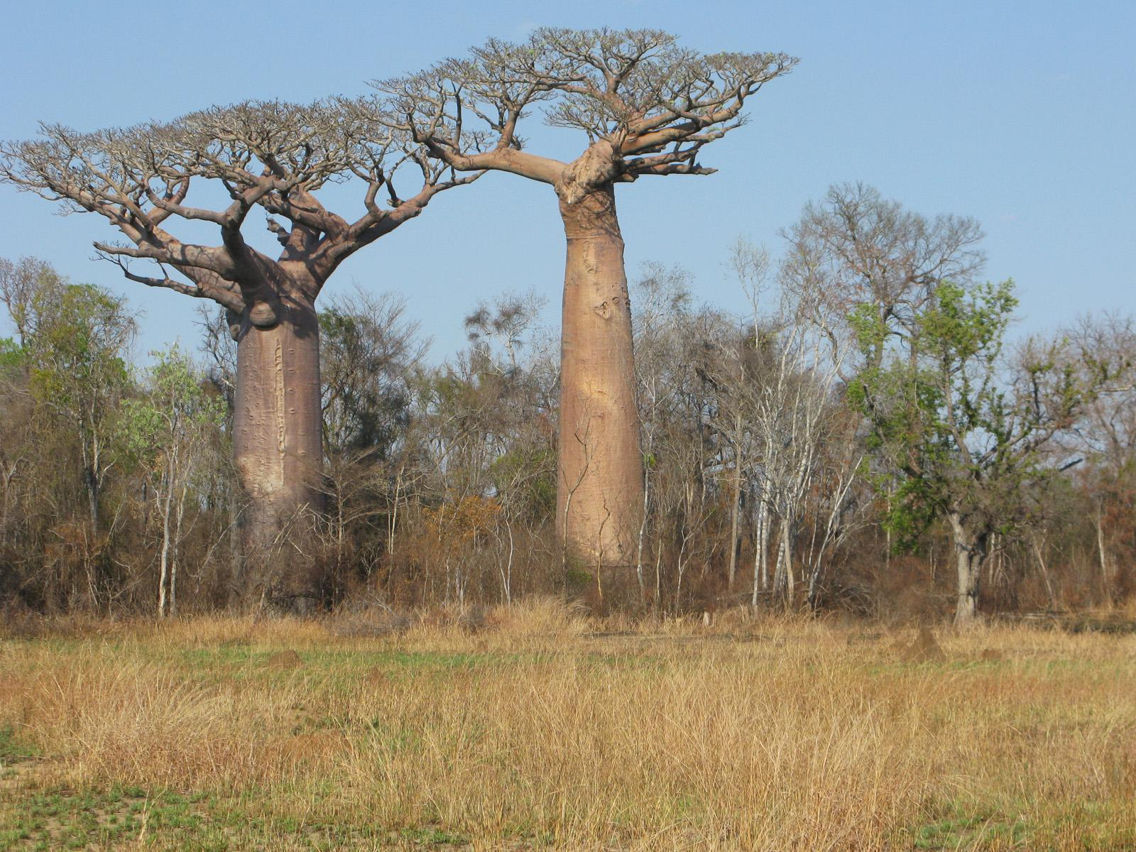 Baobab (Adansonia) du Sud-Ouest de Madagascar